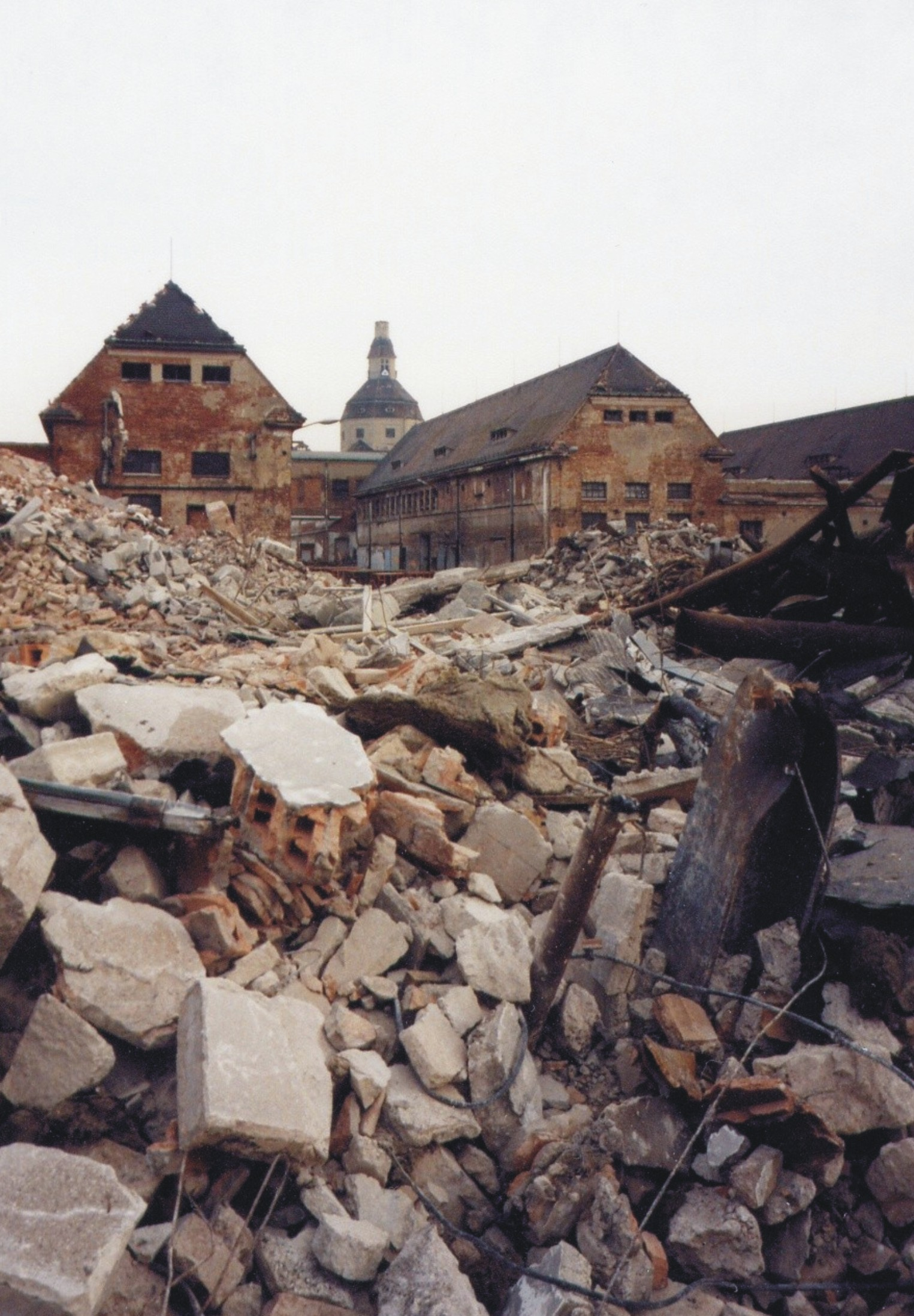 Dresdner Schlachthof im Ostragehege, Abbrucharbeiten wegen dem neuen Ausstellungs- und Messezentrum